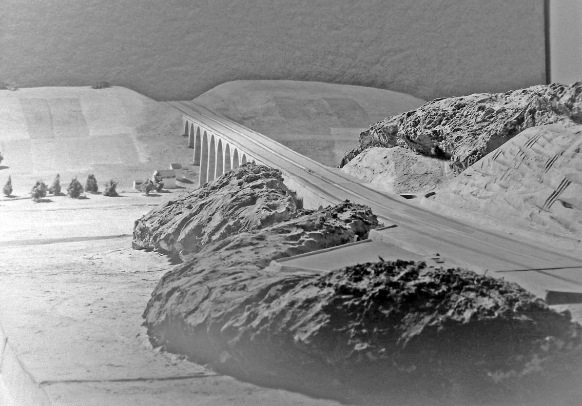 Modellfoto der Brücke bei Brünn, Reichsautobahn Wien-Brünn-Breslau